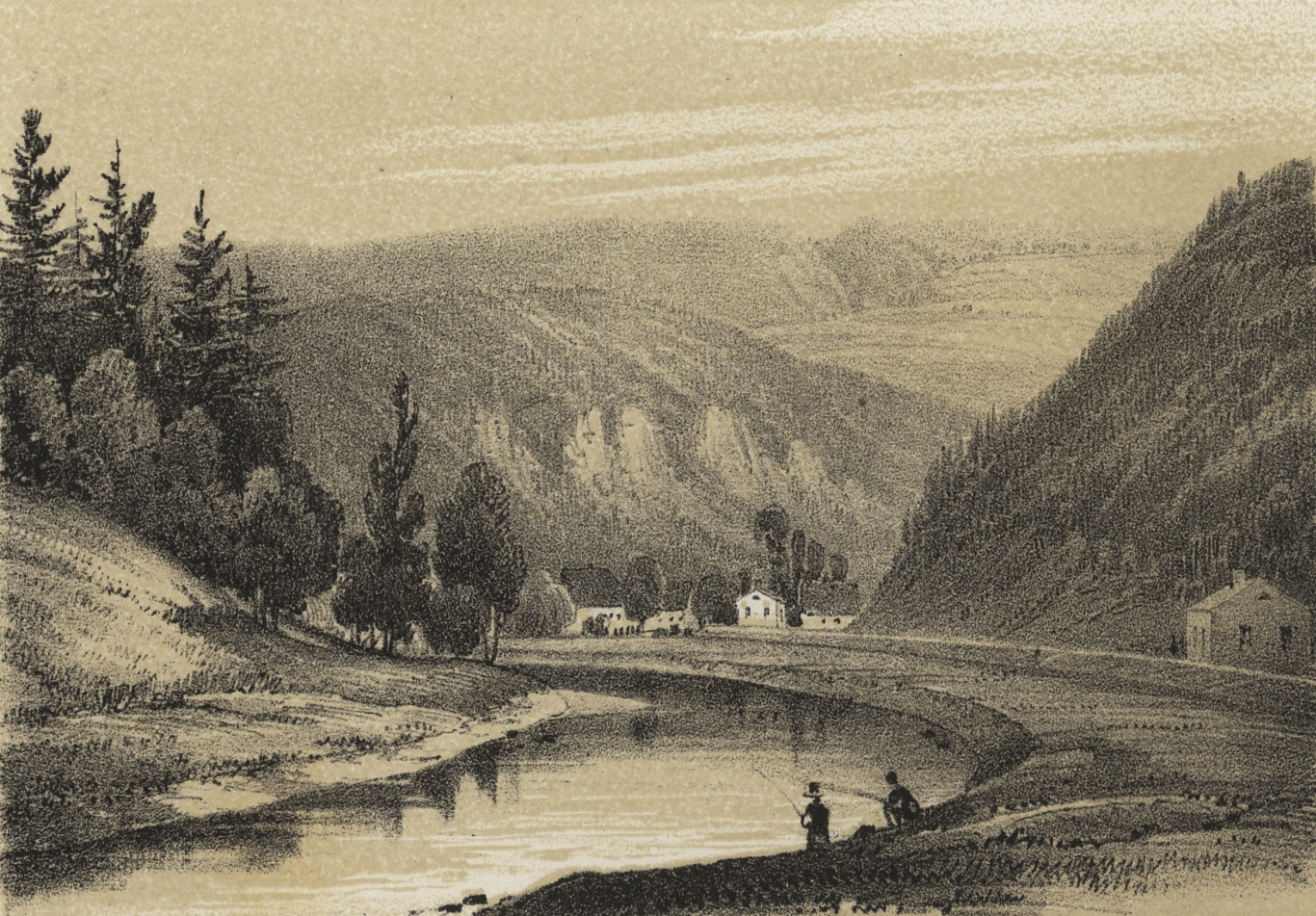 Adlerthal